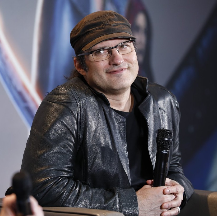 Robert Rodriguez à la présentation de Alita en février 2019